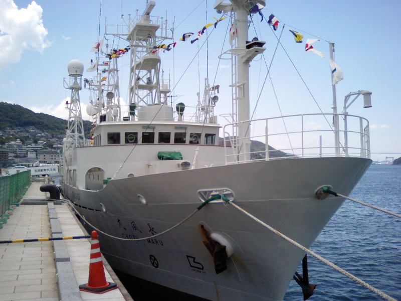 気象観測船「長風丸」の写真。